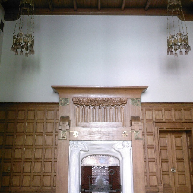 Камин с мраморным горельефом в гостиной особняка А. И. Дерожинской по адресу Кропоткинский переулок, 13, стр. 1. Дом был построен в 1901-1904 гг. по проекту Фёдора Шехтеля, является лучшим образцом московского модерна. Отреставрирован в 2009-2013 гг., с 1959-го принадлежит посольству Австралии